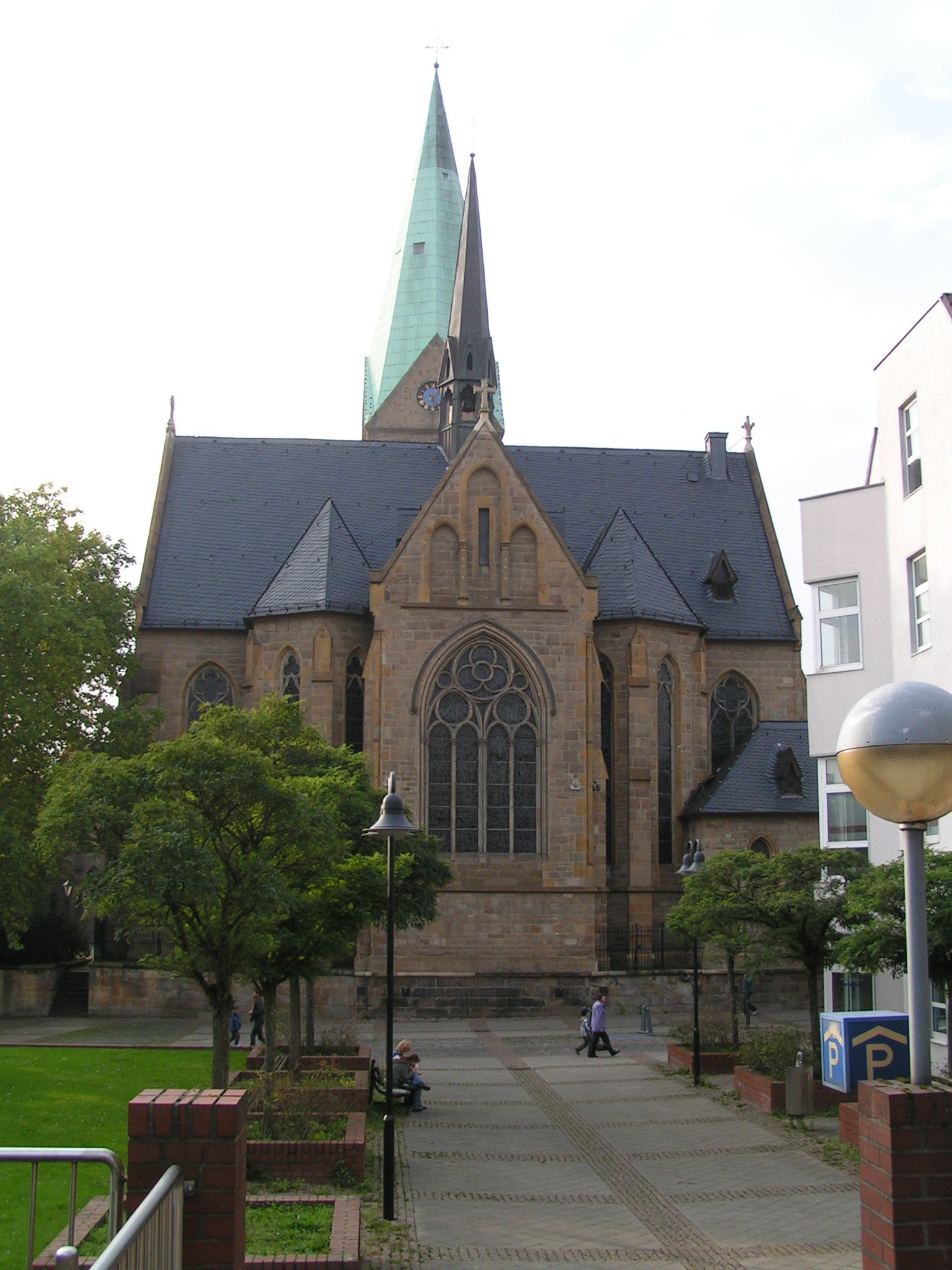 Ansicht der Propsteikirche St. Gertrud von Brabant in Wattenscheid Source: own work Date: Sept 2007, Bochum-Wattenscheid, Germany Author: Maschinenjunge Licence: GFDL, cc-by 3.0